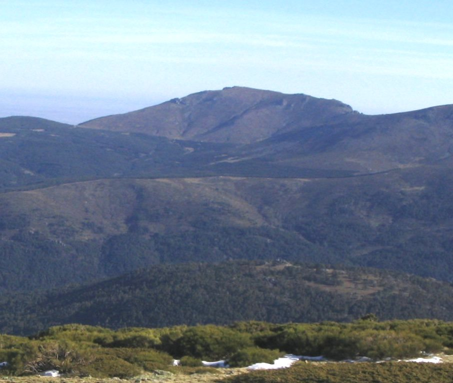 Cara norte del pico de La Najarra (Sierra de Guadarrama, España).